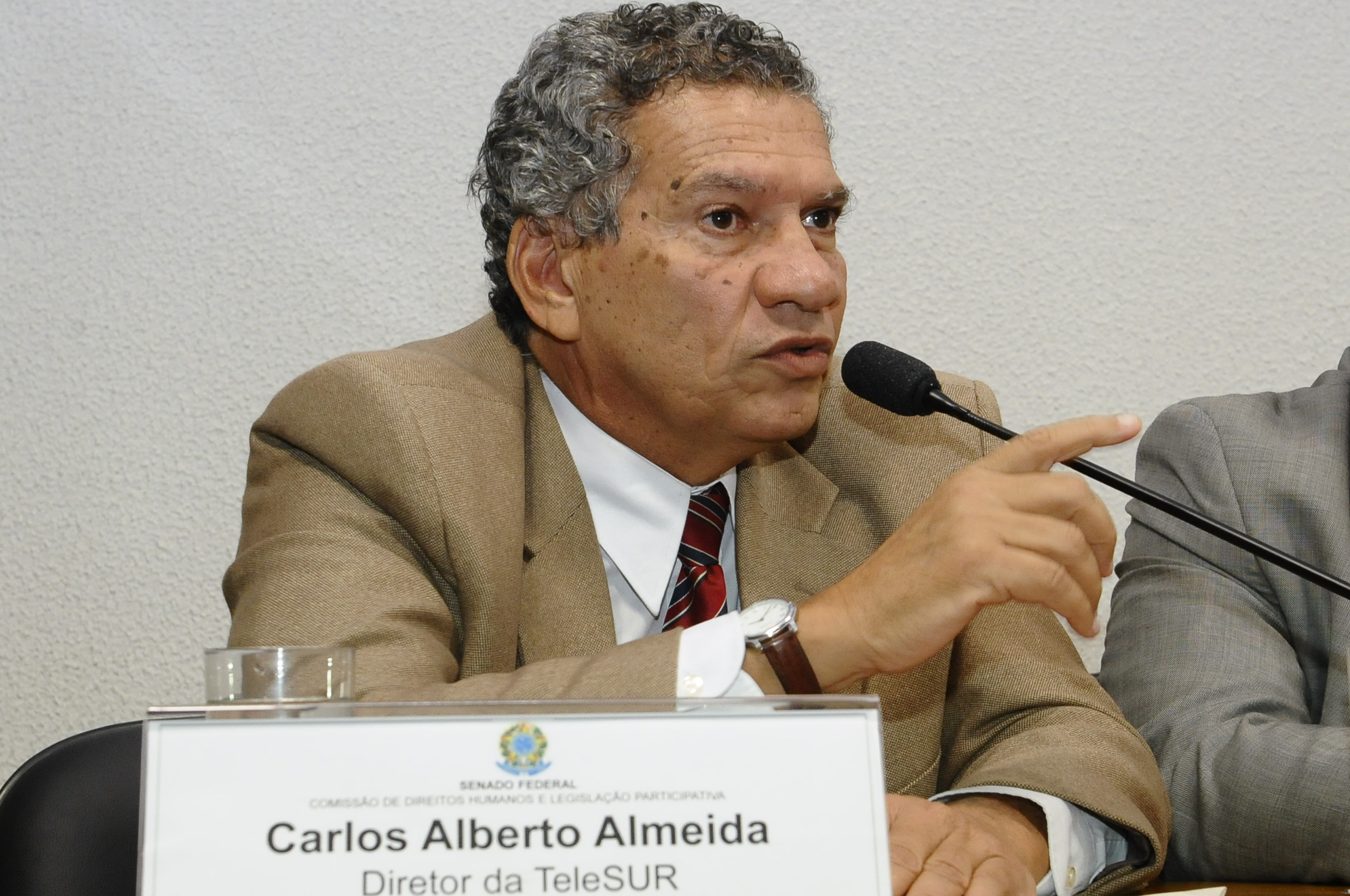 Sala de comissões do Senado durante a Comissão de Direitos Humanos e Legislação Participativa (CDH). A CDH promove audiência pública destinada a discutir o papel das TVs Comunitárias para o fortalecimento da comunicação como um direito humano fundamental. Em pronunciamento, diretor da TeleSUR, Carlos Alberto Almeida. Foto: Waldemir Barreto/Agência Senado